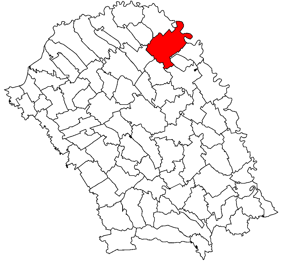 Categorie:Hărţi ale judeţului Botoşani